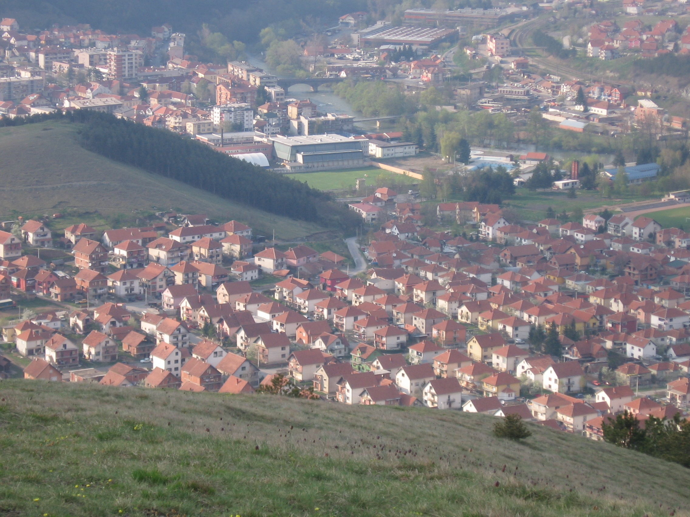 Raska.Pogled sa Lisca